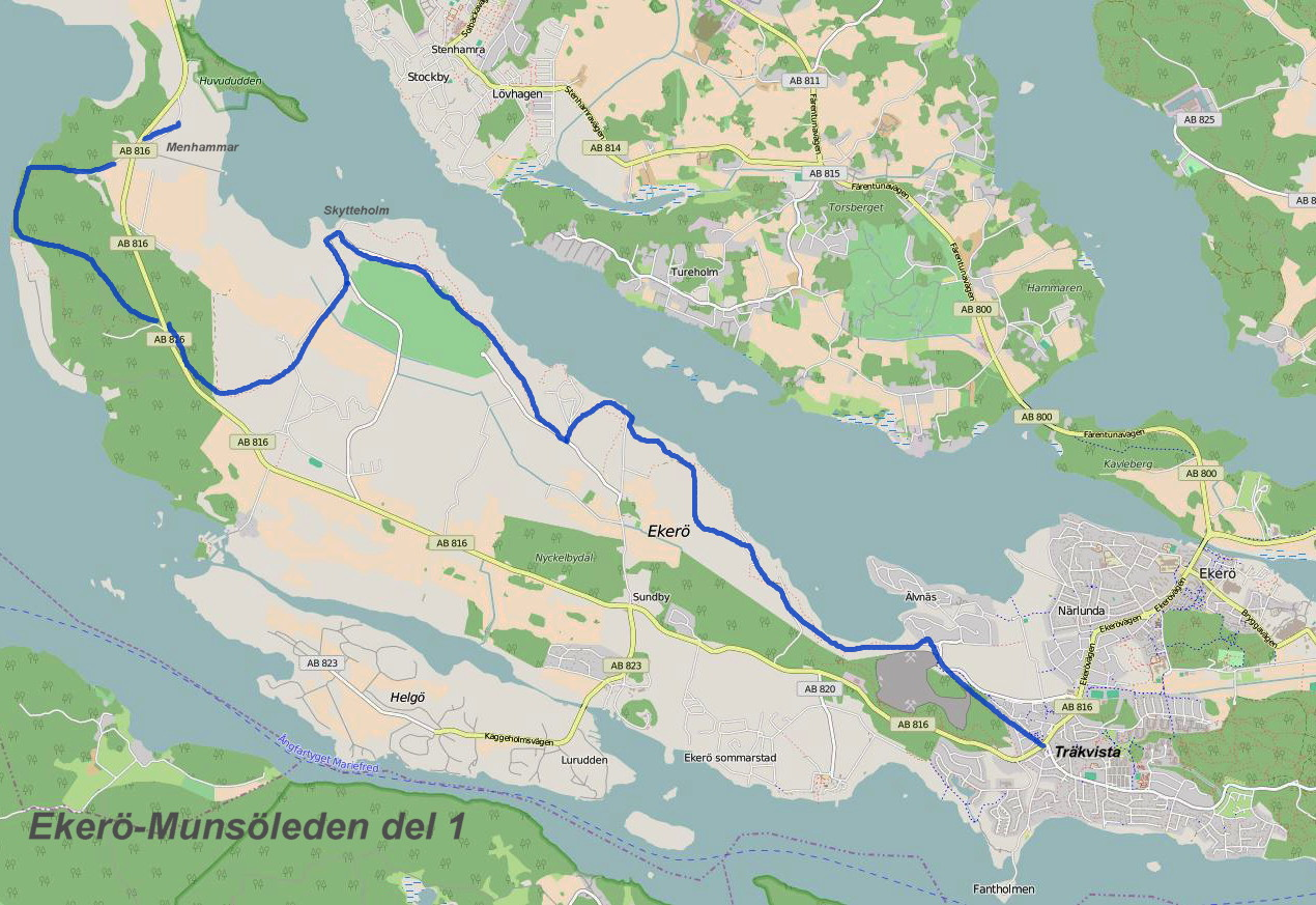 Ekerö-Munsöleden Del 1, bakgundskartan är från Open Street map